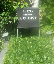 Hietzinger Friedhof-Gustav Ucicky